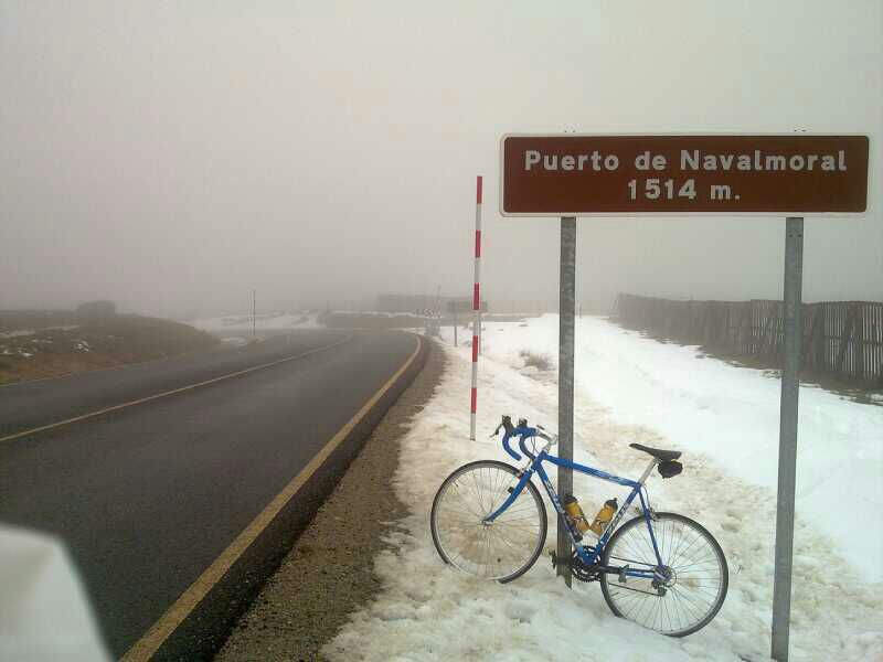 Puerto de Navalmoral, provincia de Ávila, España.